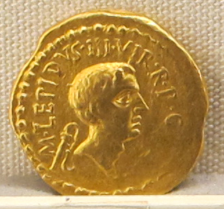 Ancient Roman coins in the Palazzo Massimo alle Terme